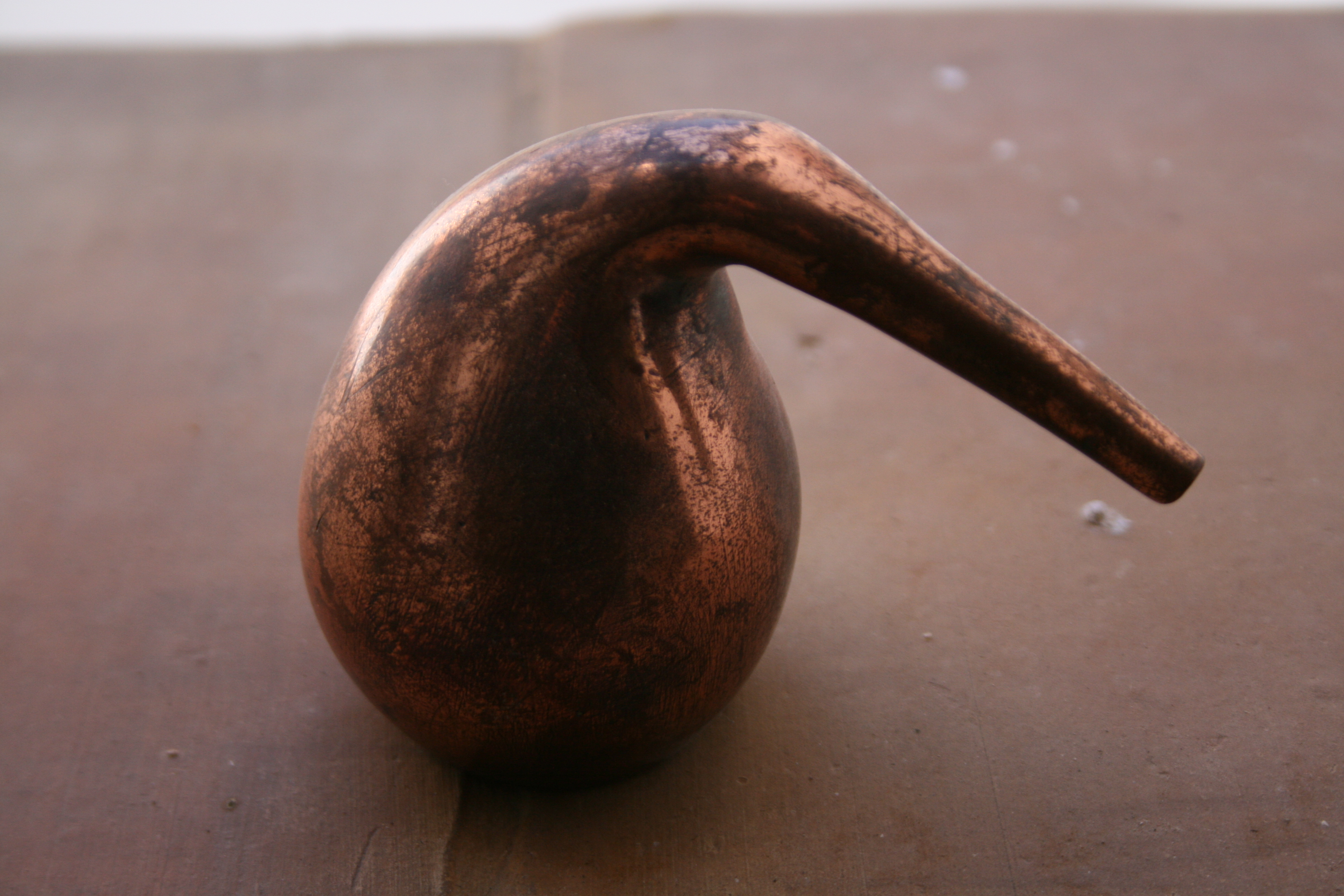 Alambique